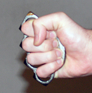 Knuckle duster